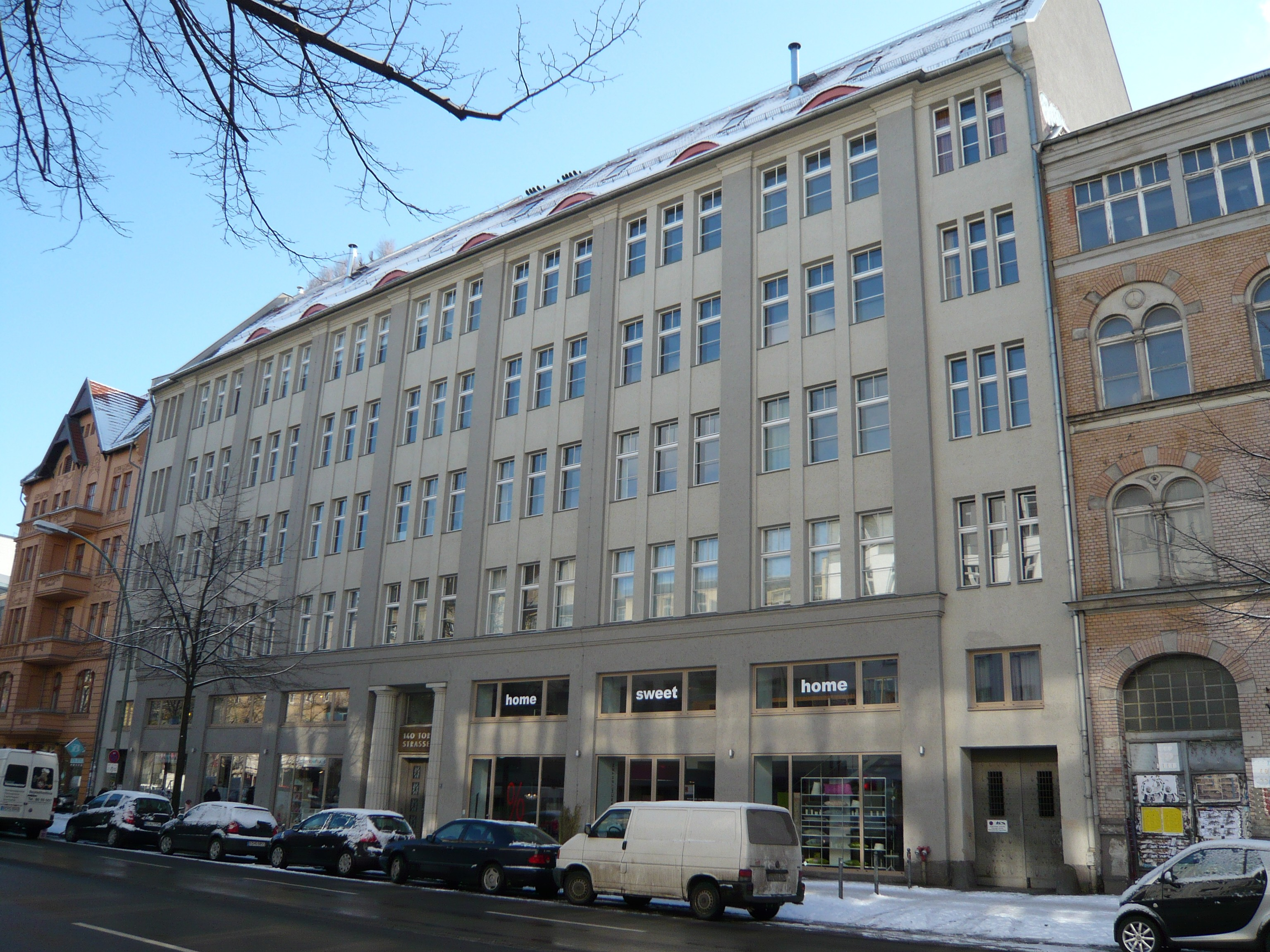 Torstraße in Berlin-Mitte: Geschäftshaus Nr. 140